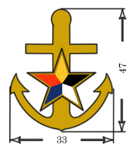 満州帝国陸軍・江上兵用帽章 康徳7年8月29日制定